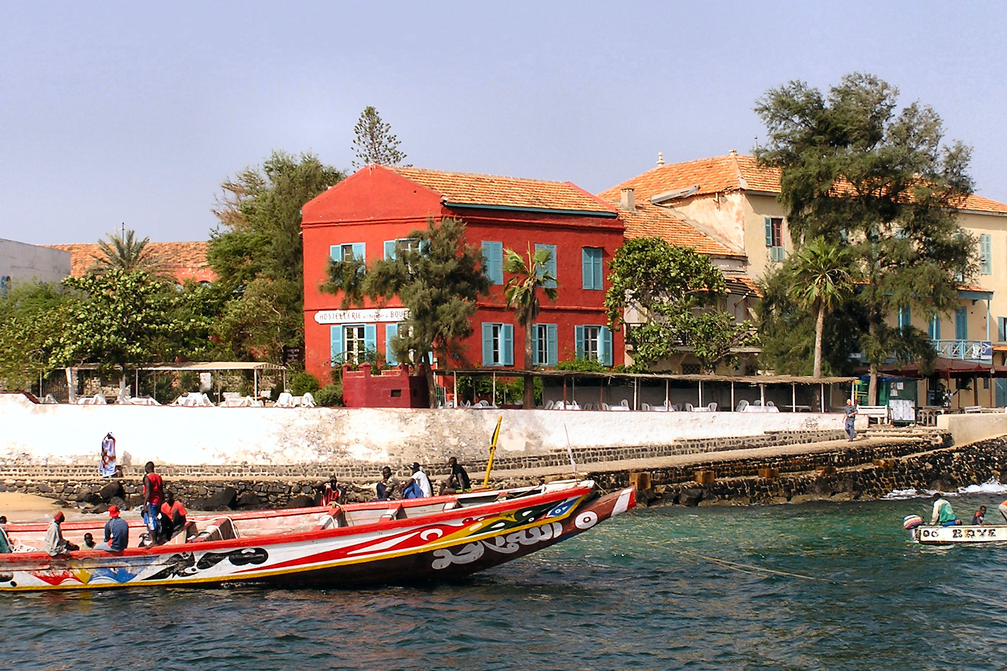 Maisons sur l'ile de Gorée (Sénégal)